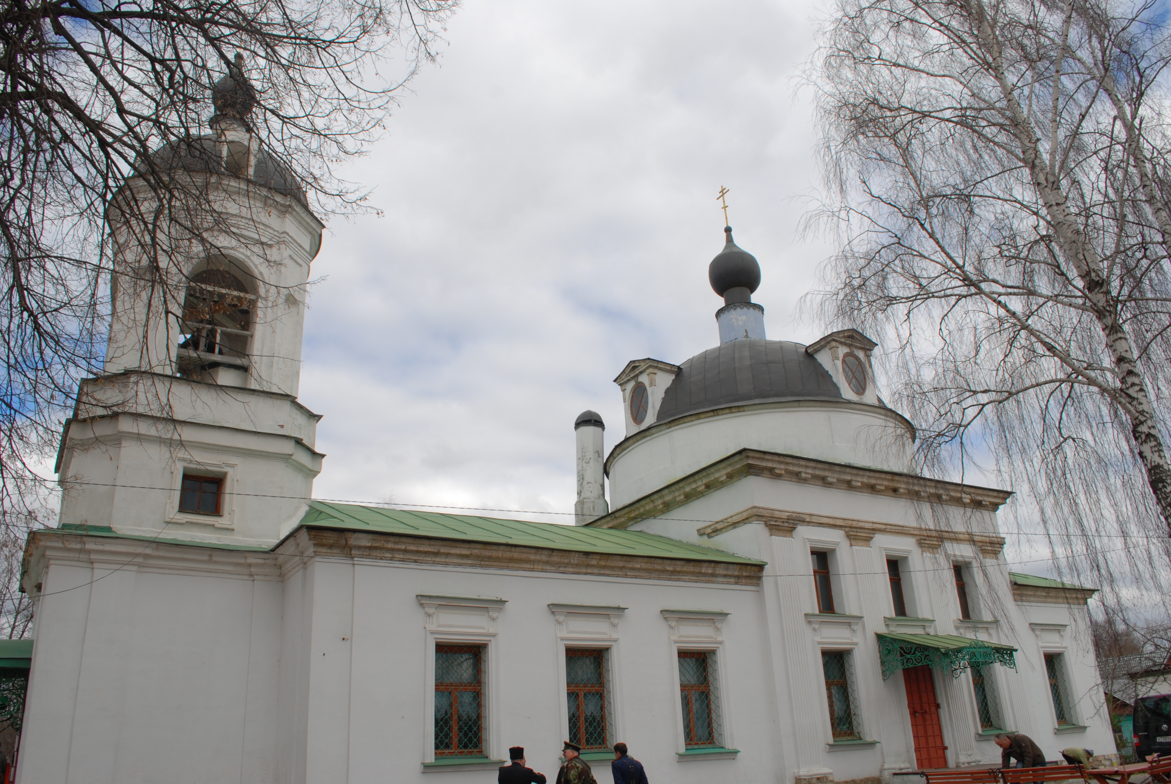 Церковь архангела Михаила (Москва и Московская область, Щербинка, село Остафьево)